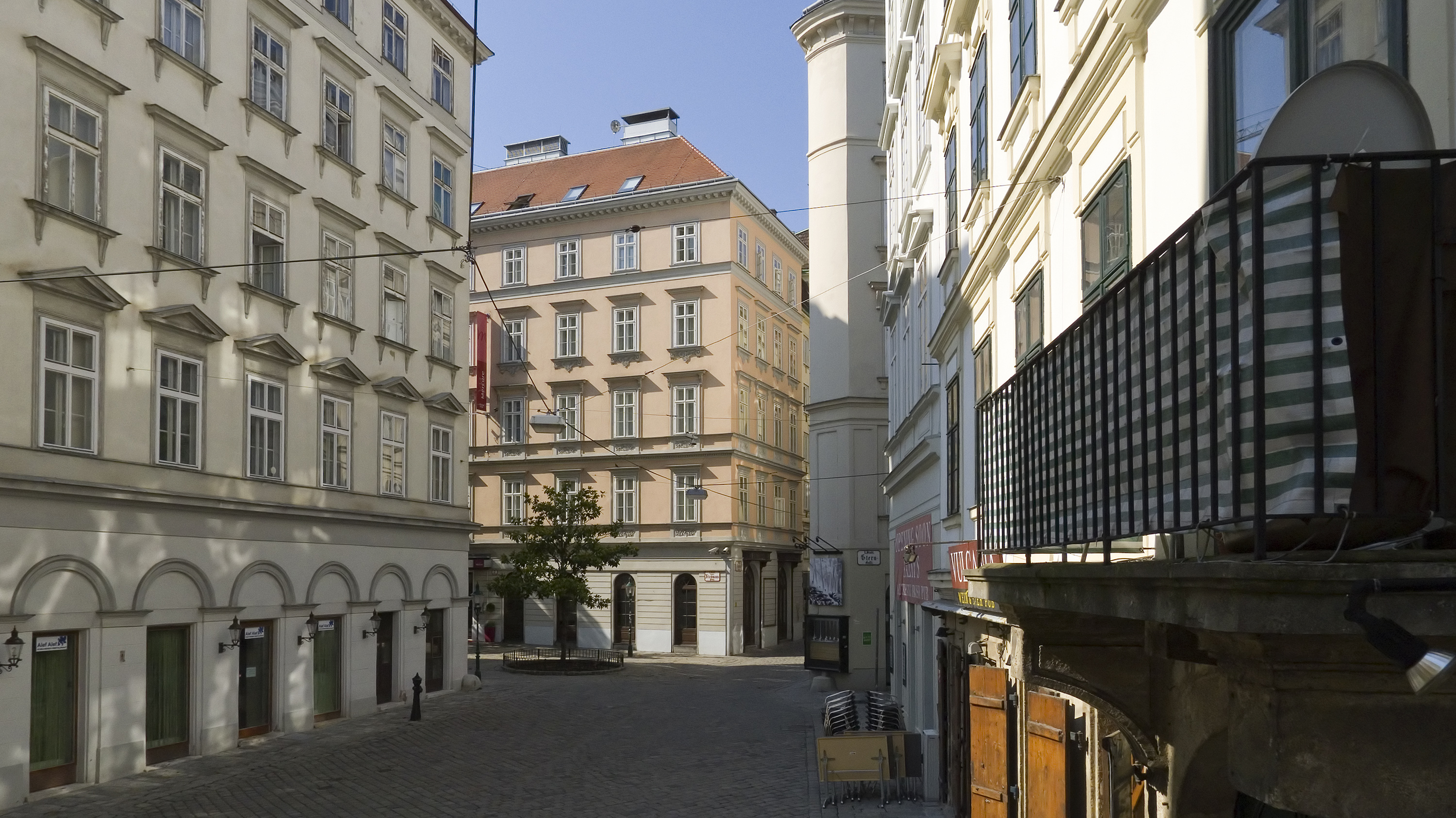 Judengasse in Wien 1 bei Nr. 11 Richtung Südwesten